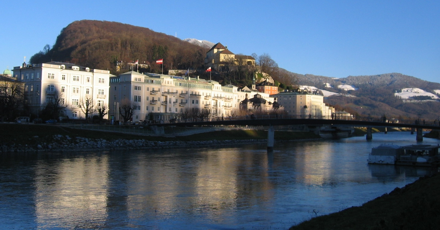 Kapuzinerberg Photograph by Gakuro